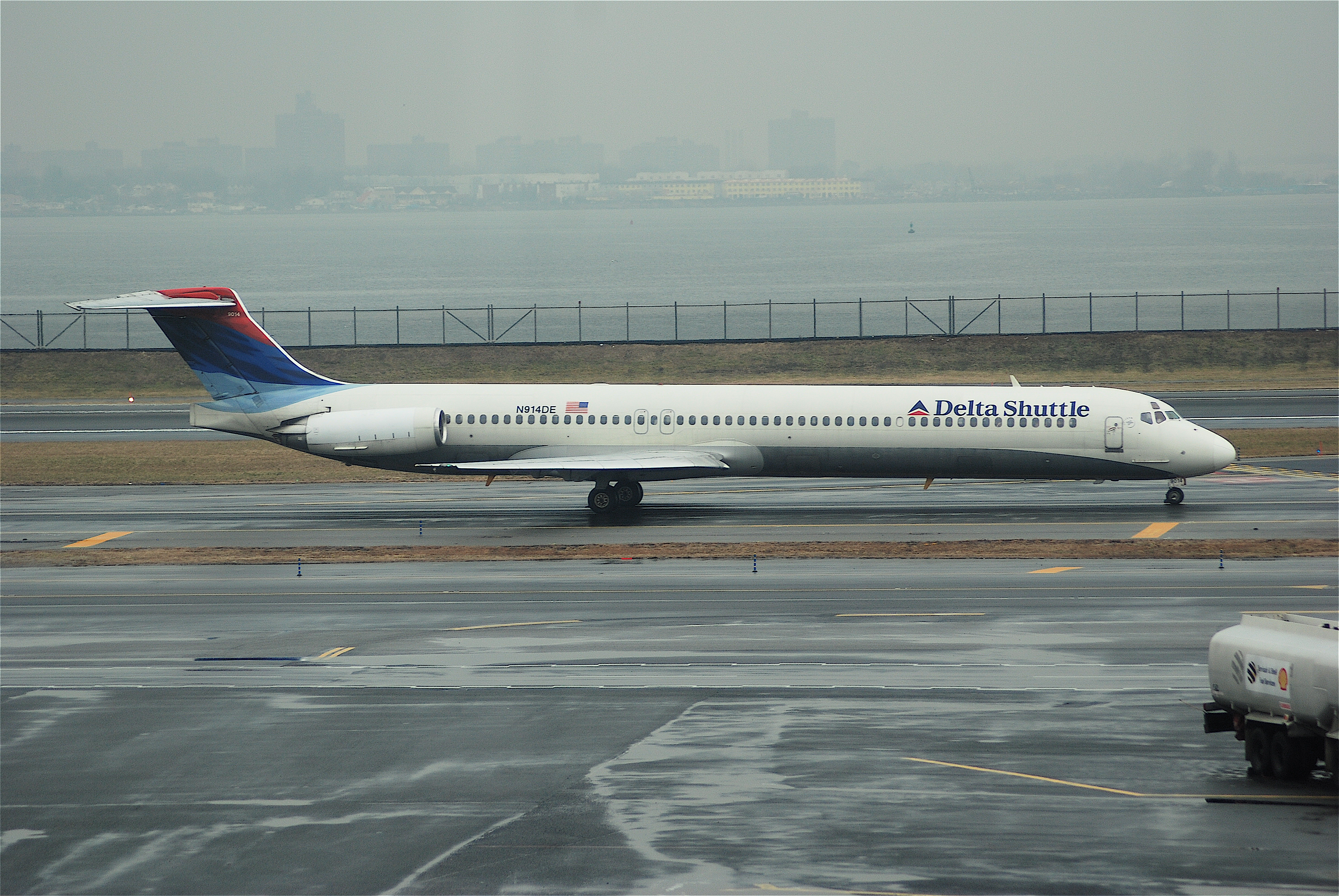 N914DE@LGA;05.02.2008/498ae